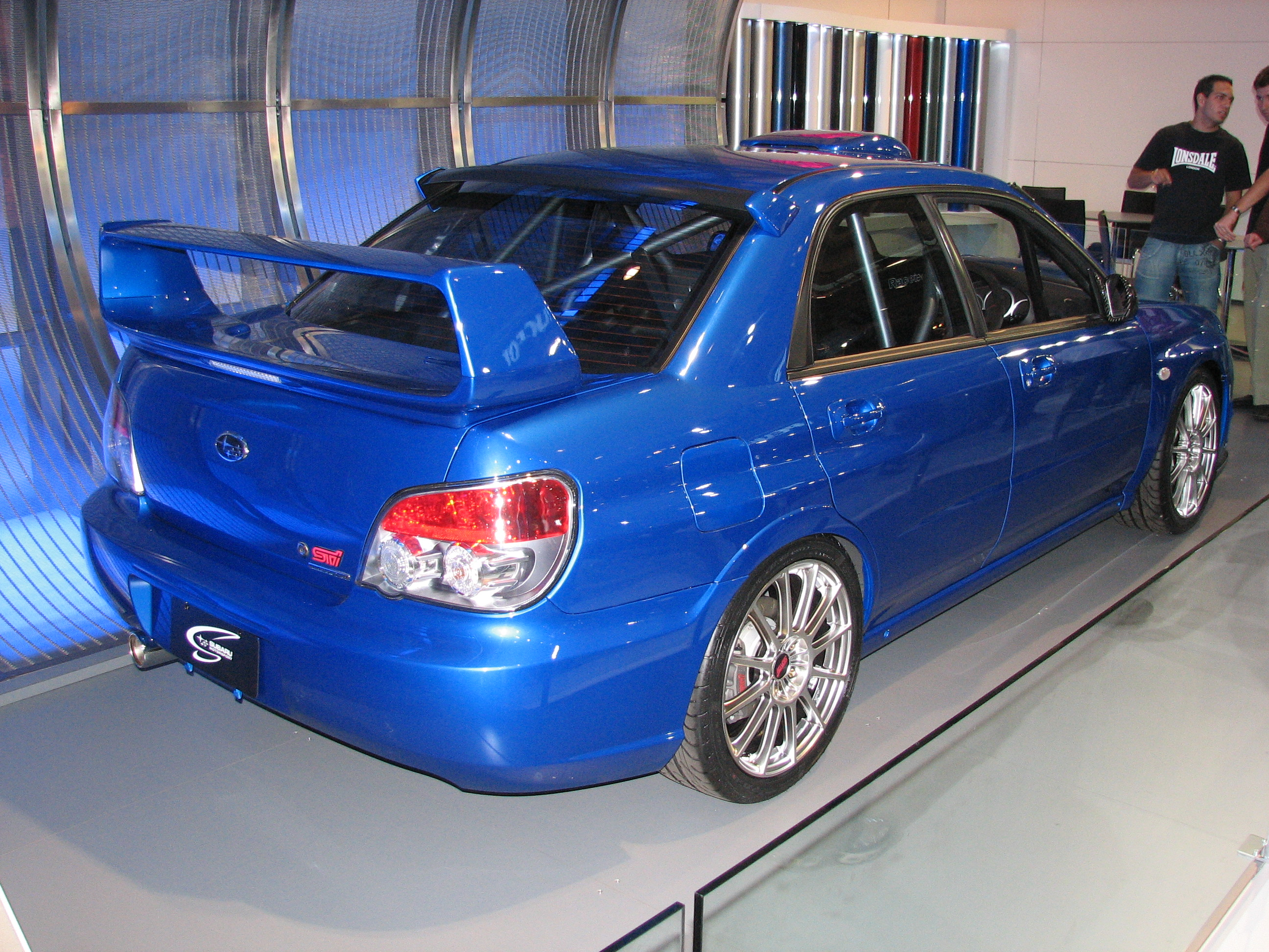 Subaru Impreza WRX STi